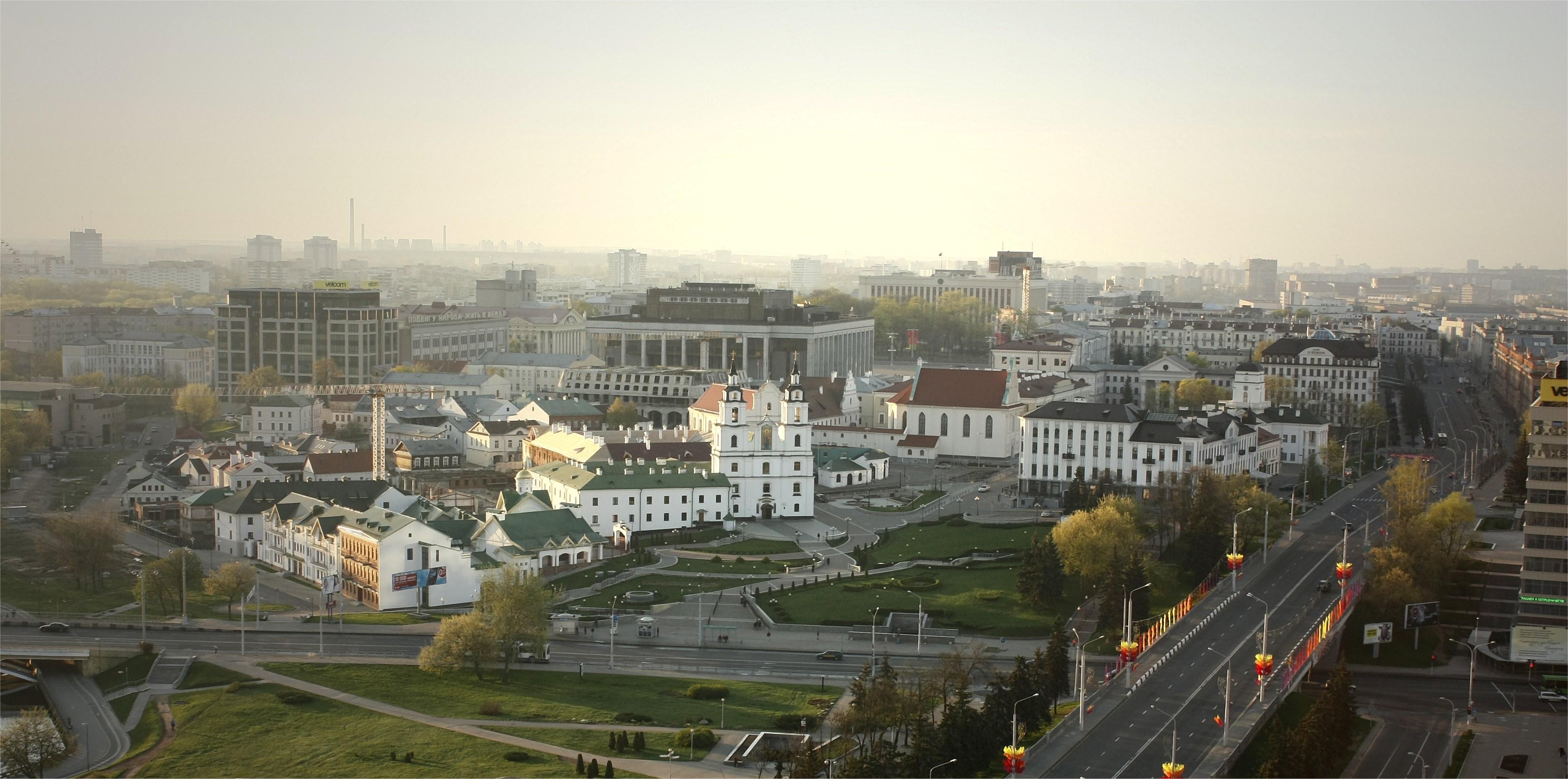 Беларуская (тарашкевіца): Гістарычны цэнтар г. Менску: будынкі і збудаваньні, пляніровачная структура, ляндшафт і культурны пласт. г. Менск This is a photo of Belarusian heritage monument. Reference number: 711Е000001 ( WLM)